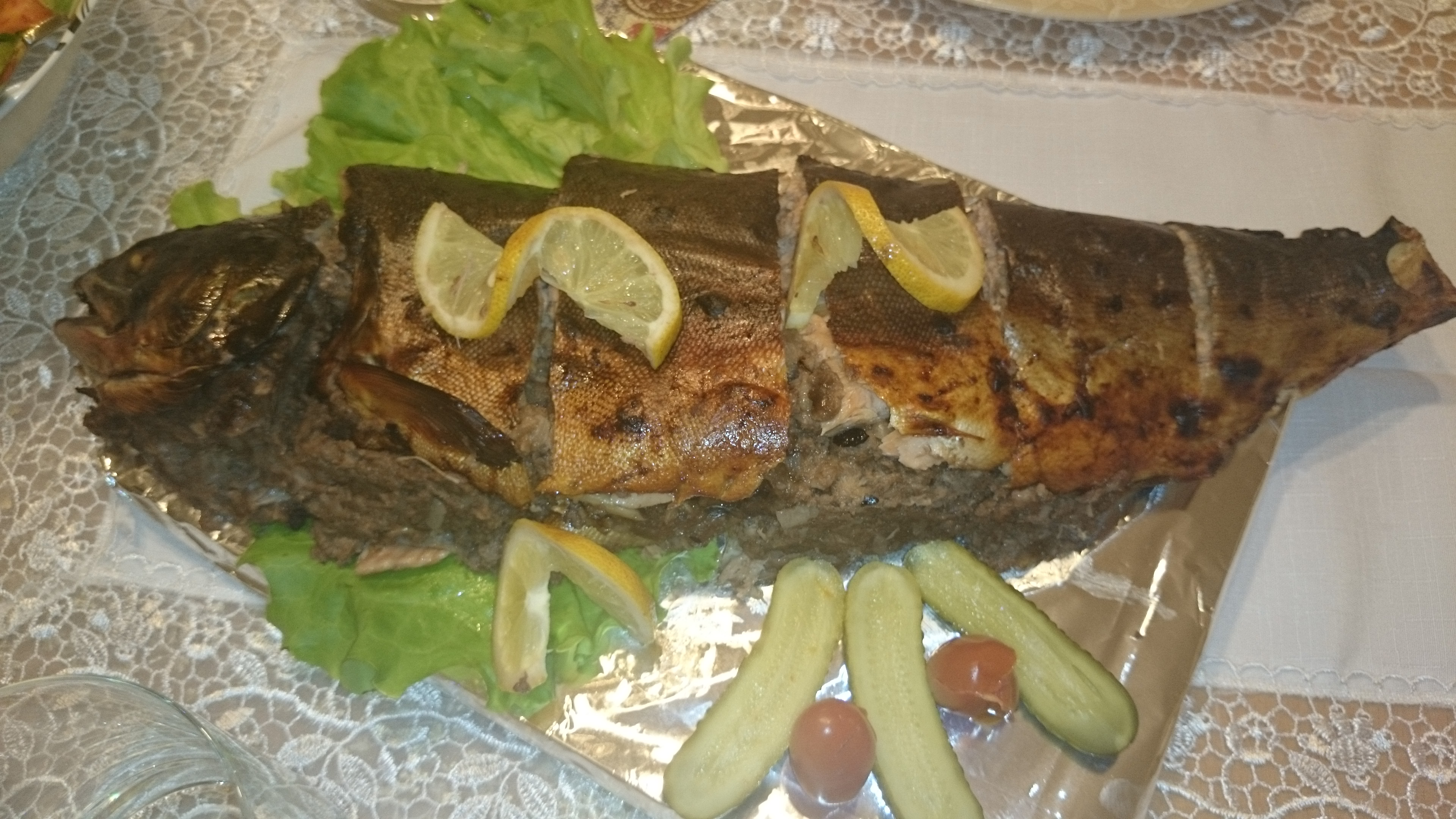 Fish levengi